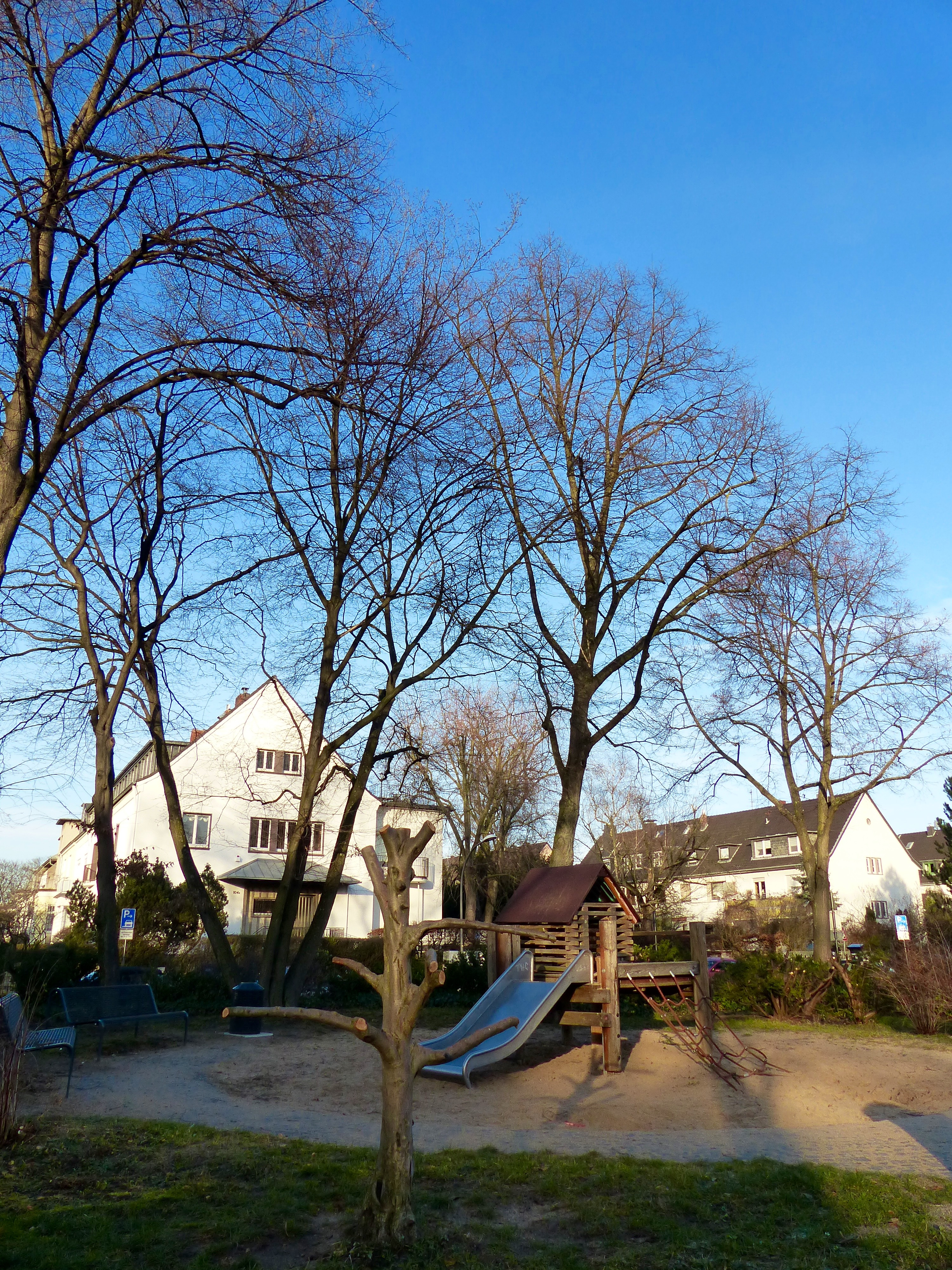 Köln-Lindenthal: Lortzingplatz, Zustand 2016